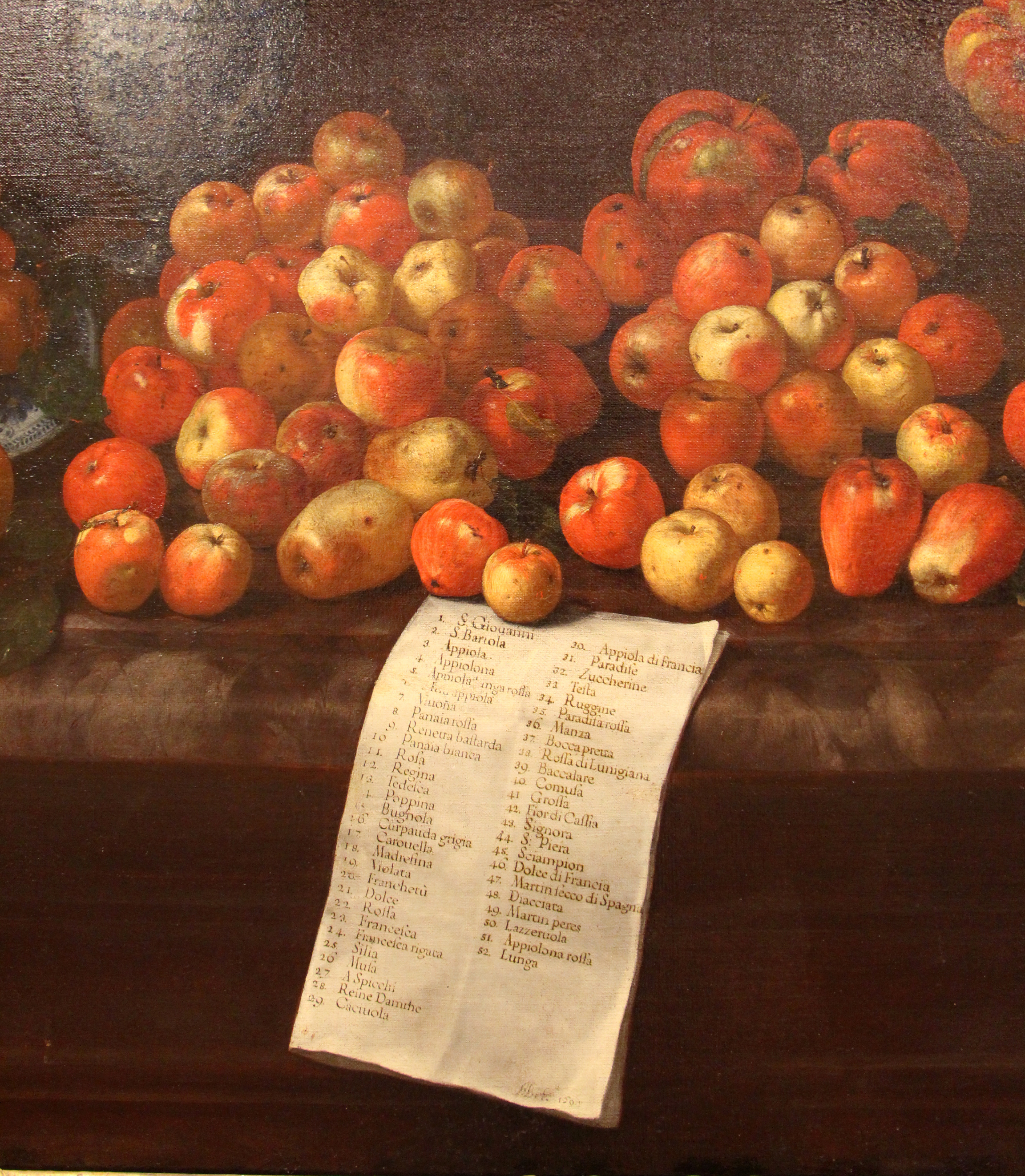 Villa medicea di Poggio a Caiano - MIBAC The making of this document was supported by Wikimedia CH. (Submit your project!) For all the files concerned, please see the category Supported by Wikimedia CH. This is a photo of a monument which is part of cultural heritage of Italy.